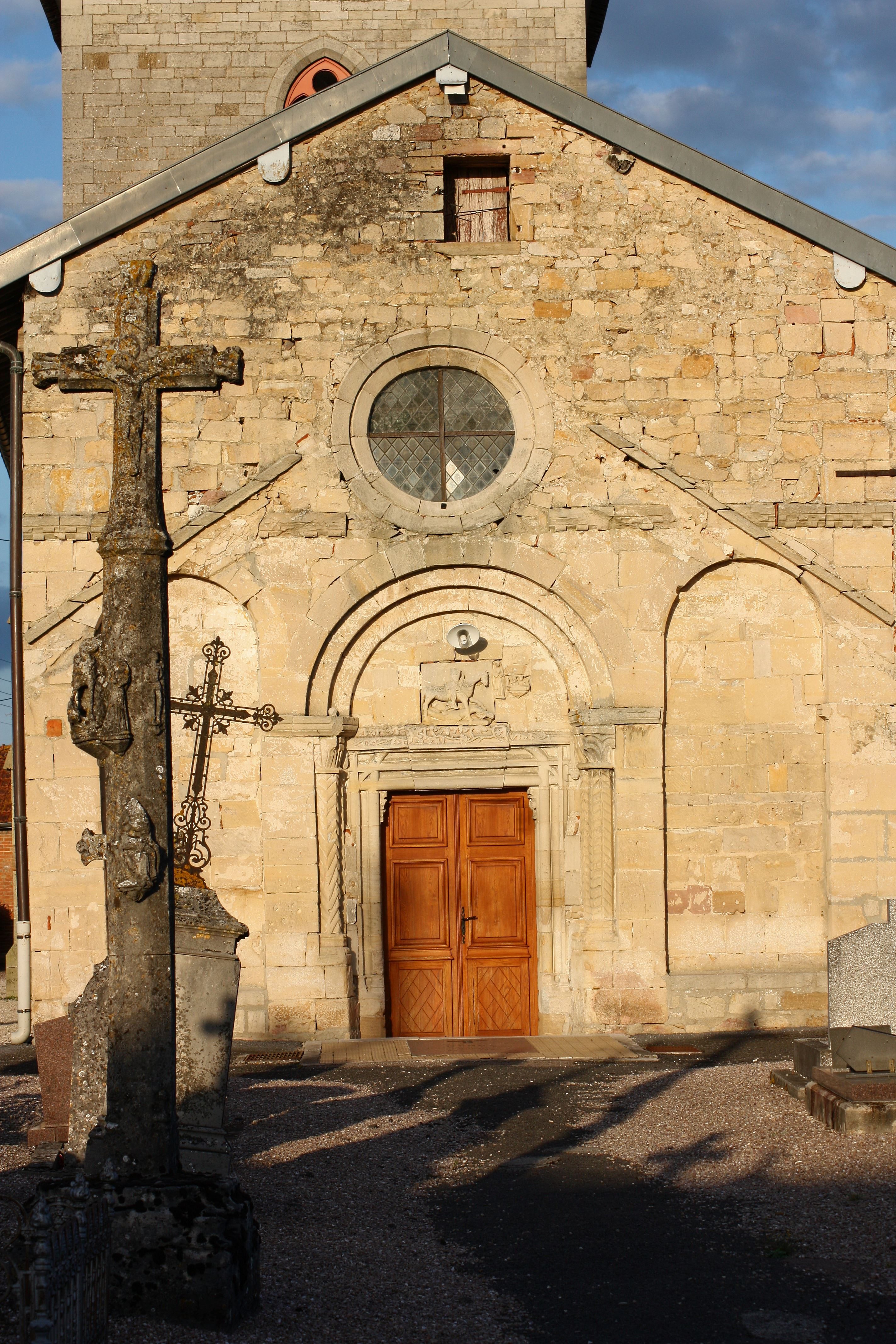 Orconte - Eglise Saint-Georges Façade Ouest